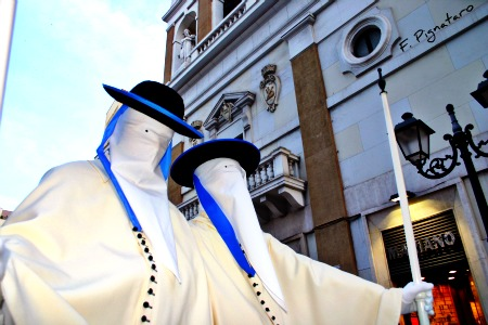 Settimana Santa di Taranto. Dalla Chiesa del Carmine esce la processione dei Misteri.